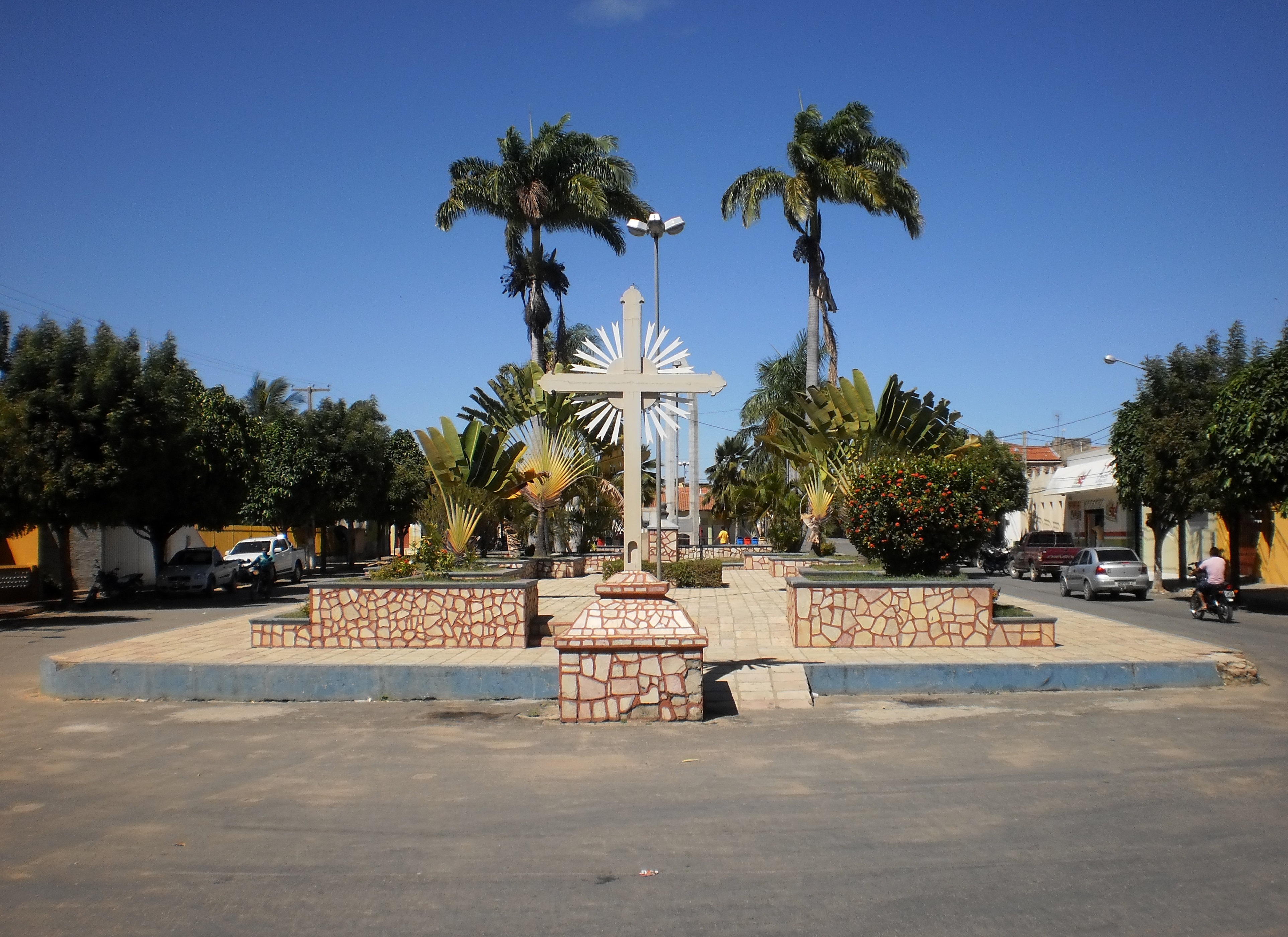 Praça Vicente do Rêgo Filho. Portalegre, Rio Grande do Norte, Brasil.